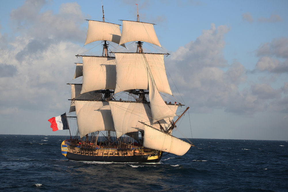 L'Hermione sous voile